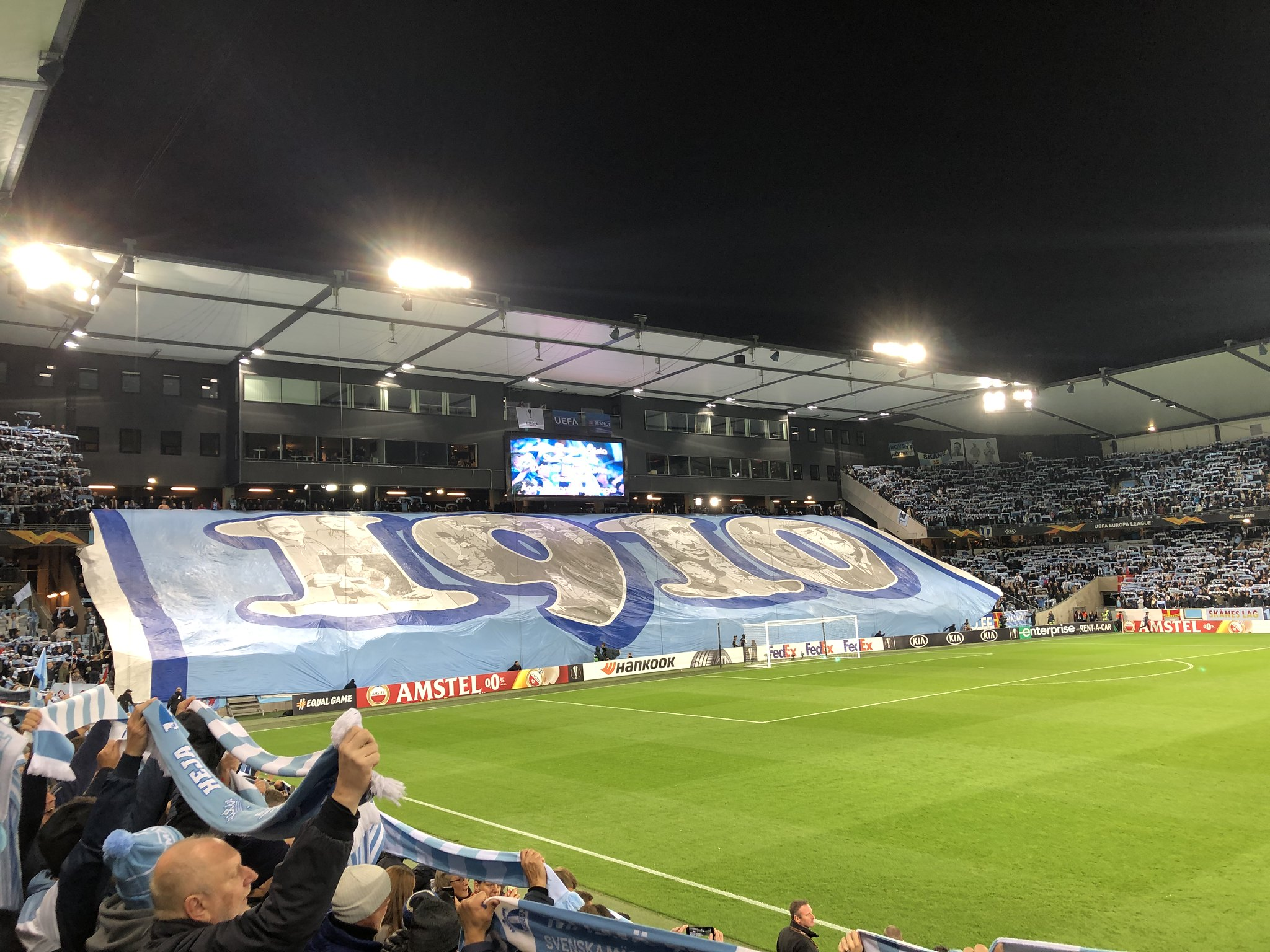 Tifo från MFF-klacken i matchen mellan Malmö FF och FC Köpenhamn